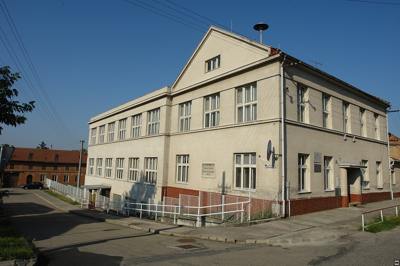 bývalá škola v Držovicích